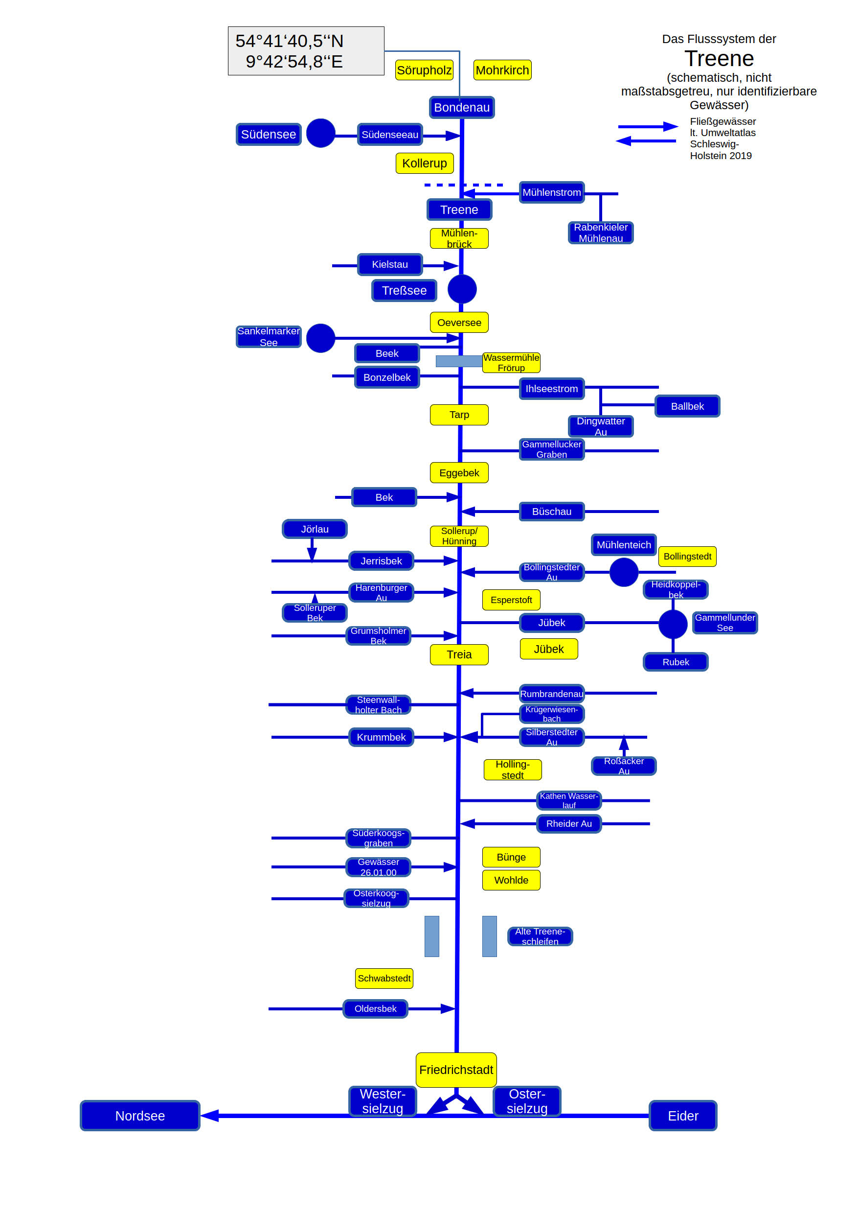 Flusssystem der Treene / schematische Darstellung